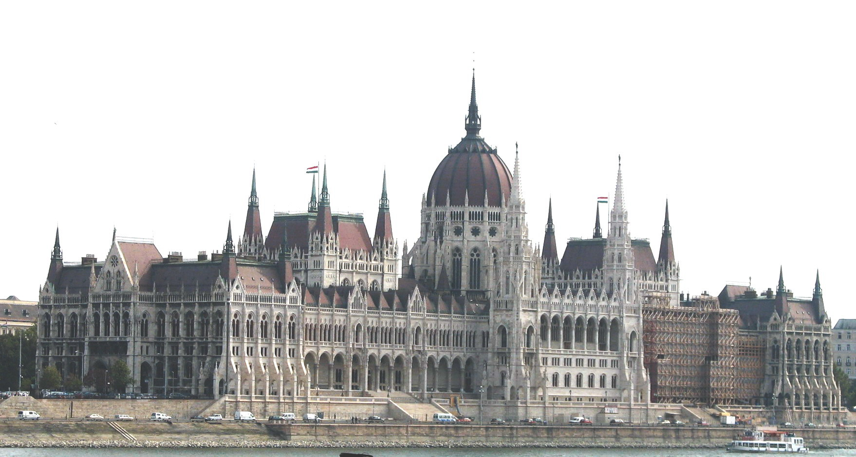 Hungary, Budapest, parliament.